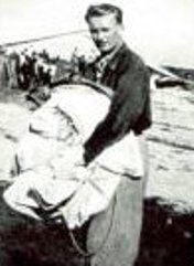 Rotter Lajos (1901 – 1983) magyar gépészmérnök, repülőgép-tervező és pilóta, a Karakán és a Nemere vitorlázó repülőgépek tervezője